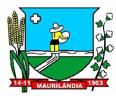 brasao maurilandia